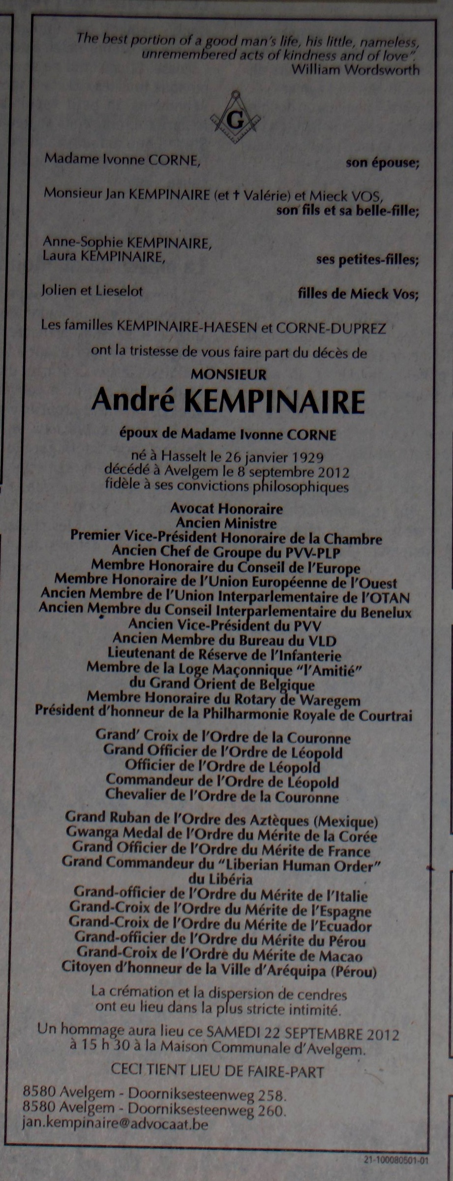 Nécrologue d'André Kempinaire, ancien politicien libéral et maire d'Avelghem (Belgique, Flandre occidentale) (parue dans La Libre Belgique de 14 sept. 2012)